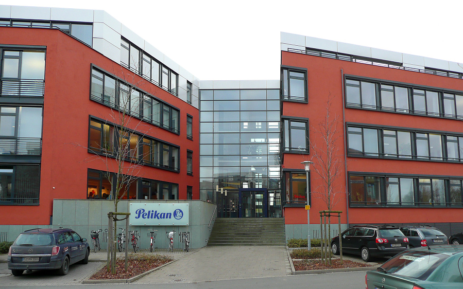 Pelikan Verwaltung in Hannover.